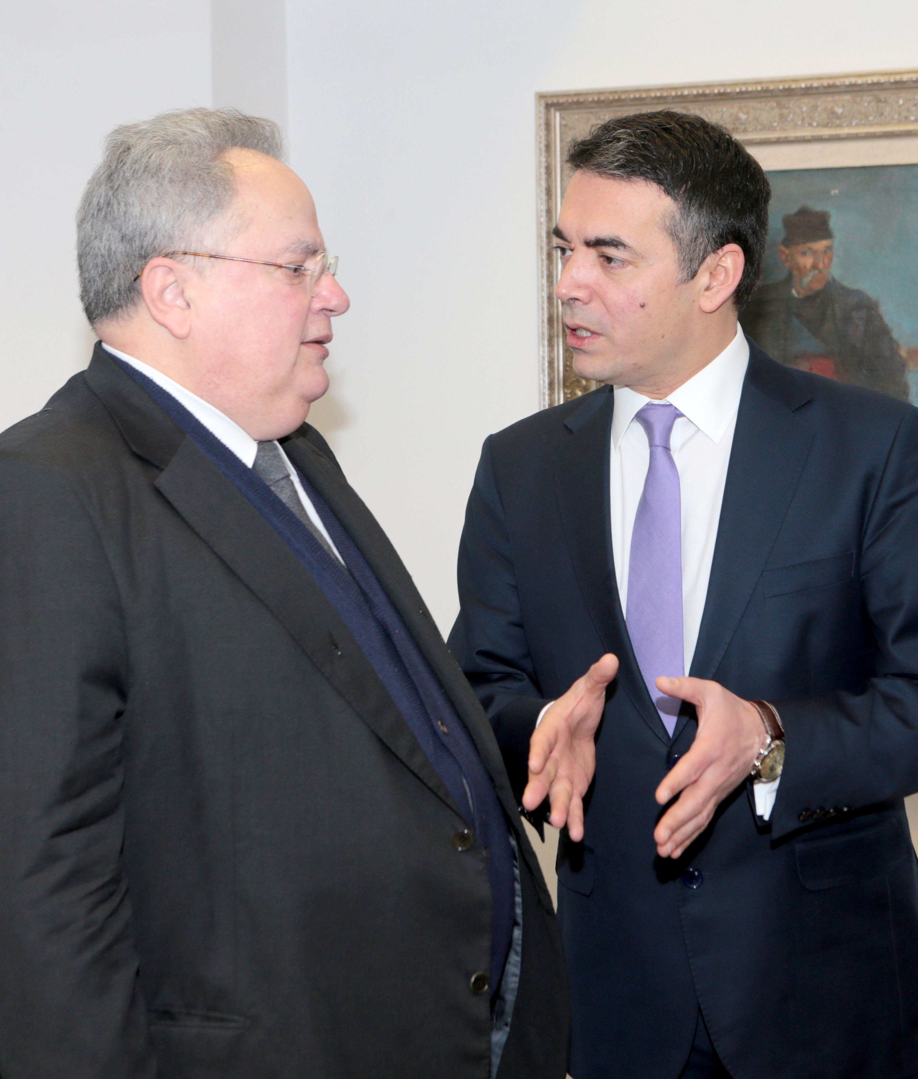 Επίσκεψη, Υπουργού Εξωτερικών, Ν. Κοτζιά στην πΓΔΜ- Συνάντηση ΥΠΕΞ, Ν. Κοτζιά, με ομόλογό του της πΓΔΜ, N. Dimitrov (23.03.2018) ΠΗΓΗ: ΑΠΕ-ΜΠΕ